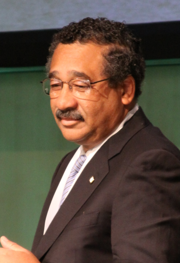 EGCC 29